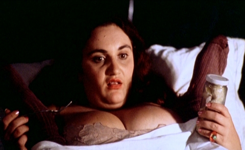 Képkocka a „Csúfak és gonoszak” című filmből